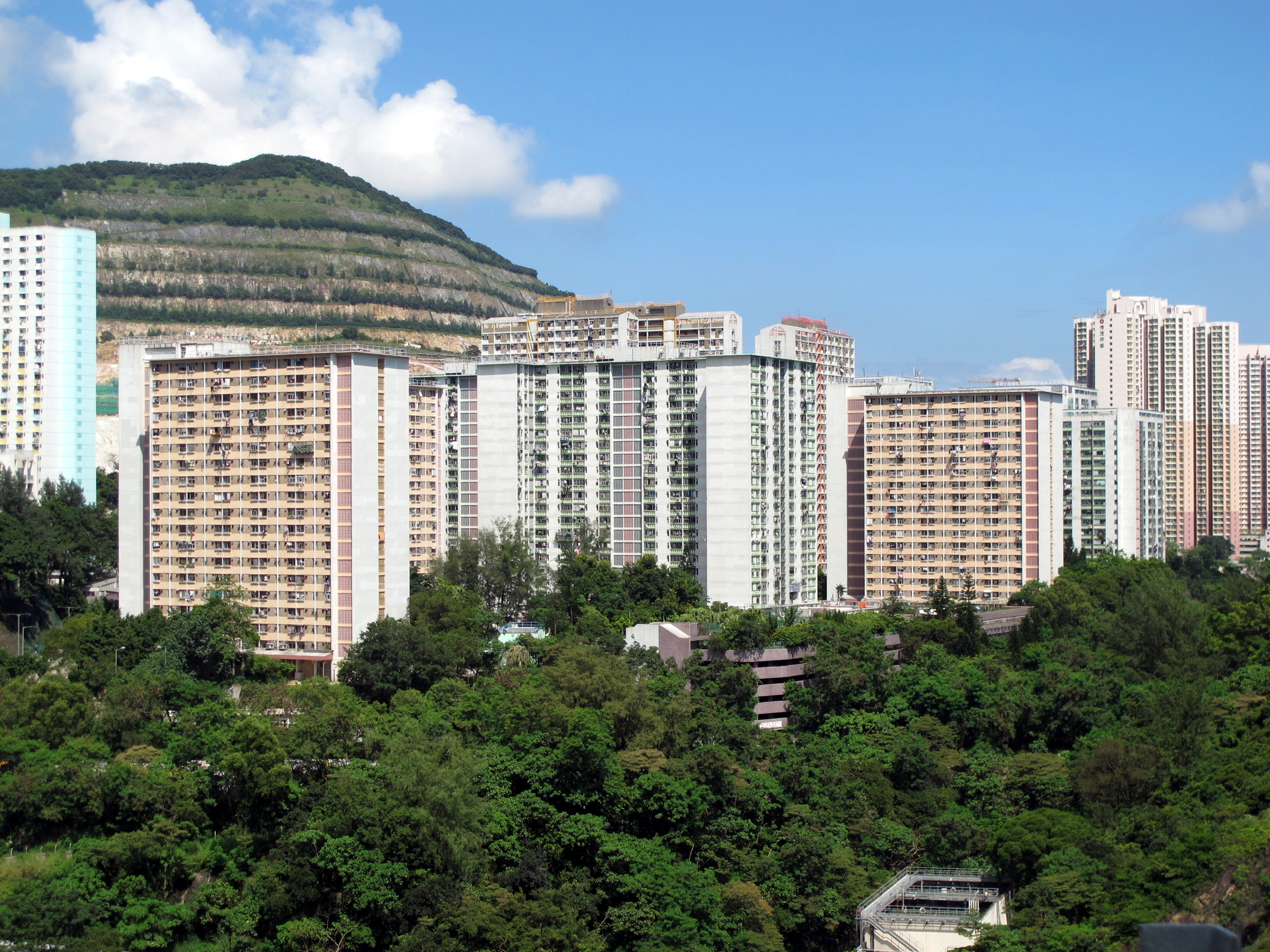 Shun Tin Estate 順天邨